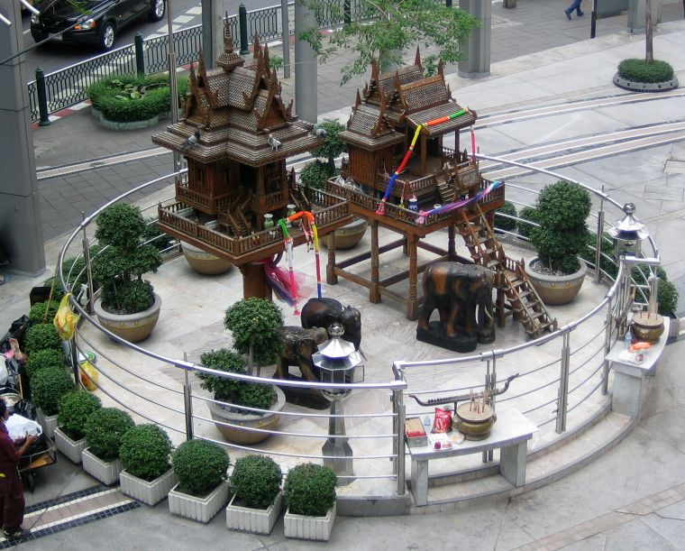 Spirit Houses. (Geisterhäuschen) Bangkok. Hannah Steinacker